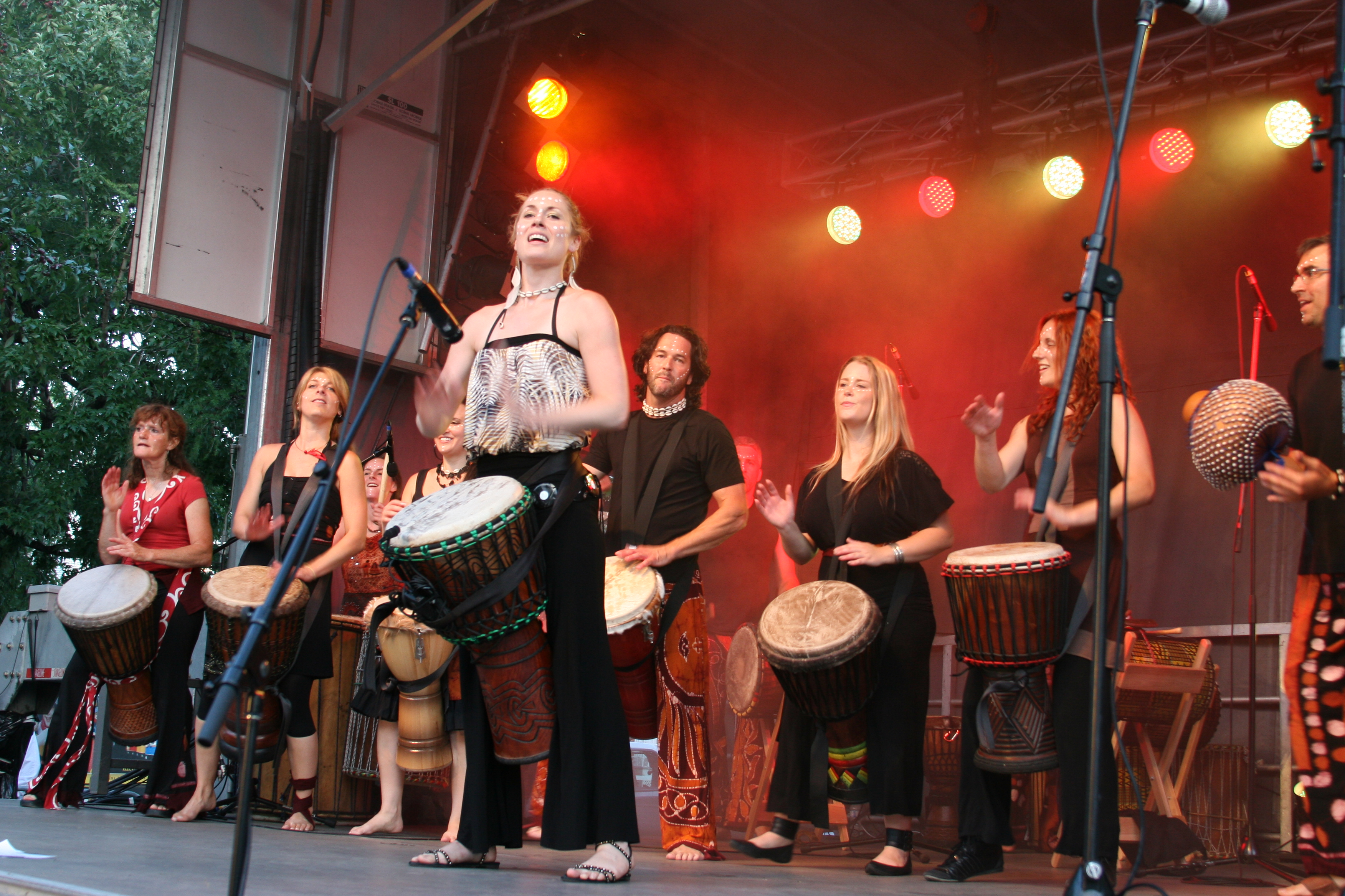 Festival International de Percussions de Longueuil